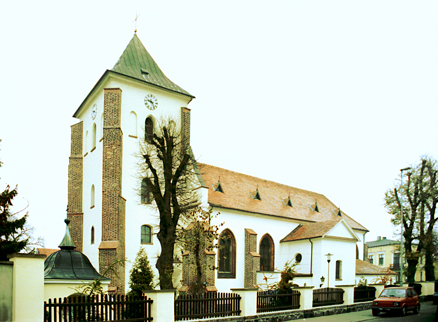 Oborniki; kościół Wniebowzięcia NMP (Oborniki, Church of St. Mary)